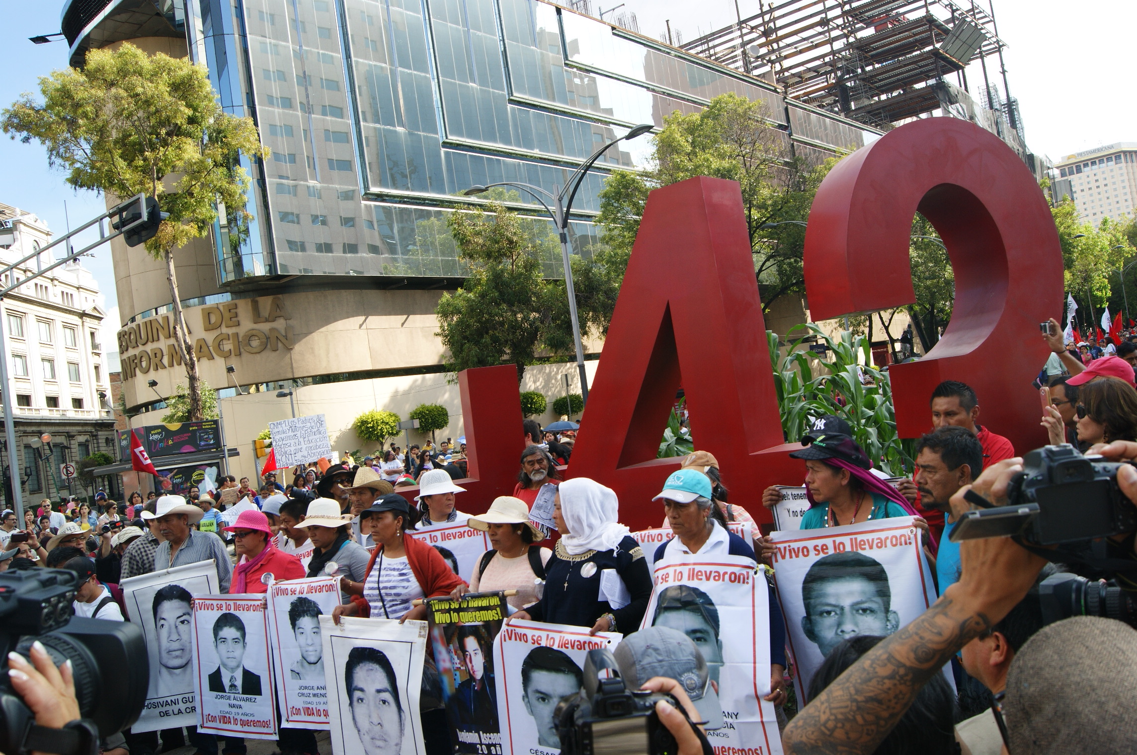 Marcha por los 10 meses sin los normalistas de Ayotzinapa